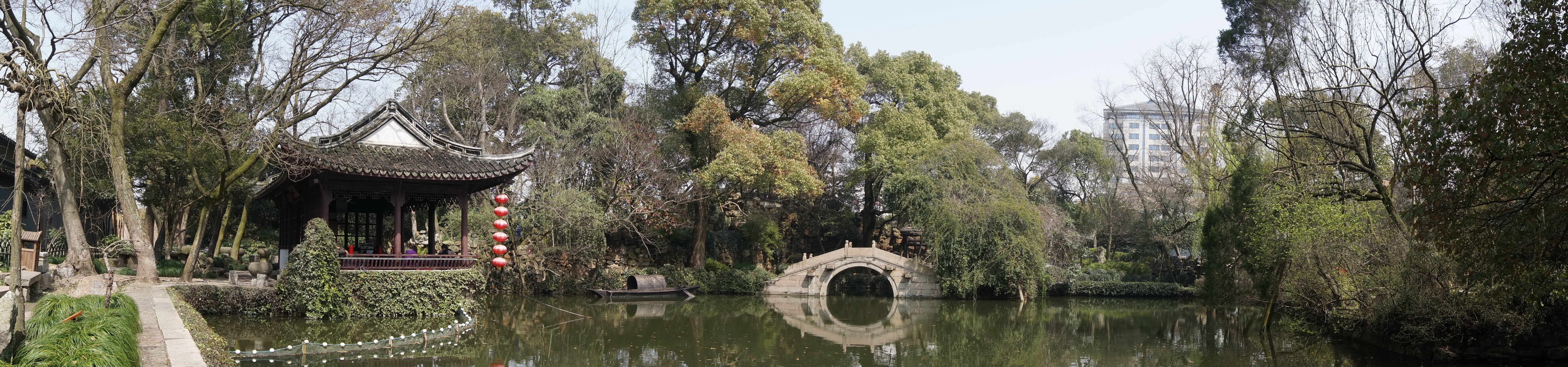 海盐绮园全景。